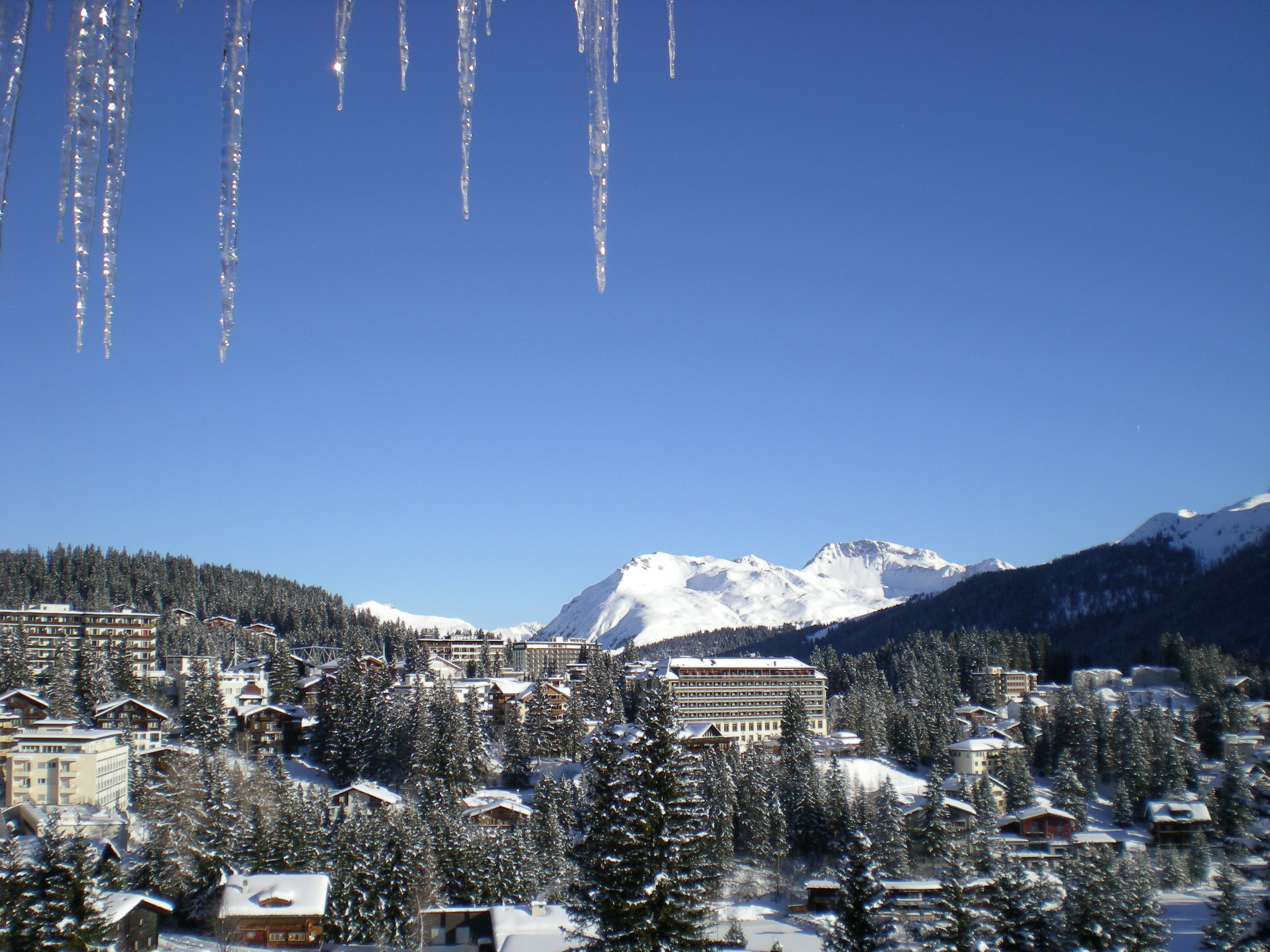 Arosa Dorf Richtung Davos/Parsenn rechts unten Untersee mit alter Badi